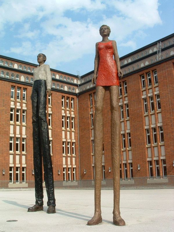 Skulpturen Mann und Frau des Bildhauers Stephan Balkenhol vor der Zentralbibliothek in Hamburg.This is a photograph of an architectural monument.